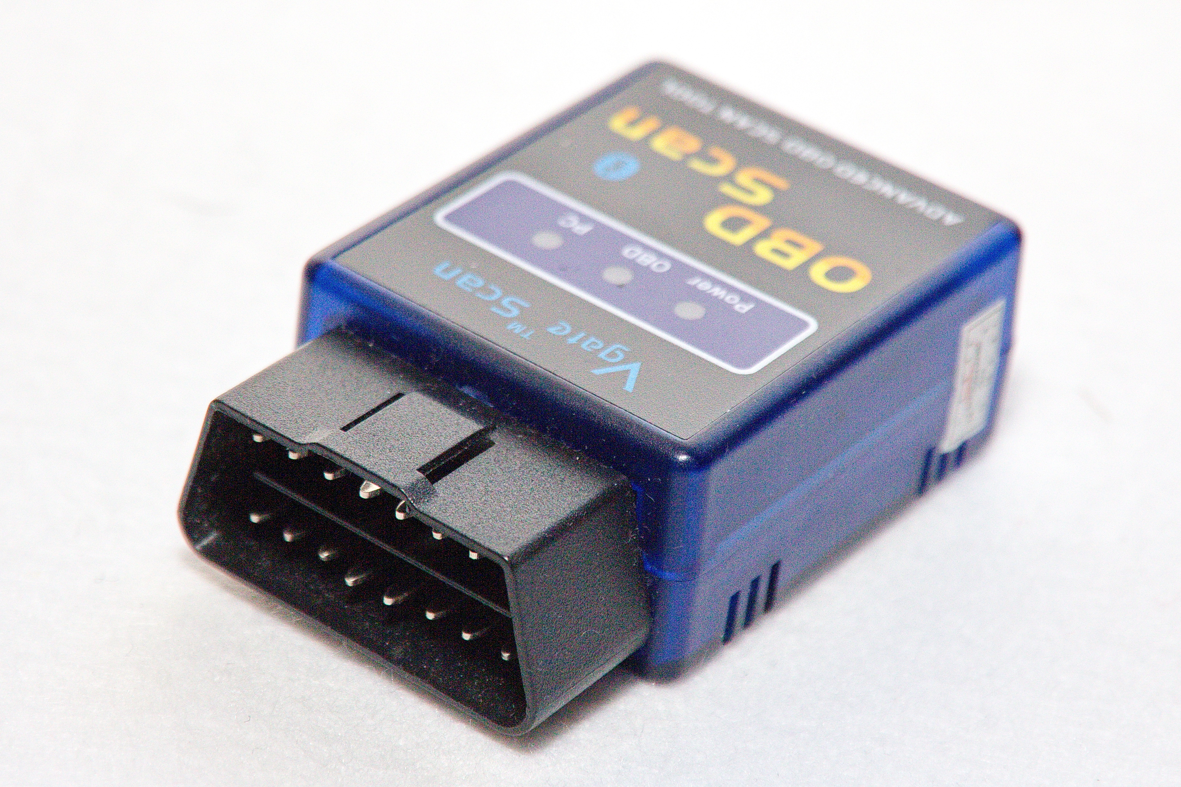 Bluetooth ELM327 OBD2-Scanner